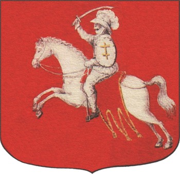 Беларуская (тарашкевіца): Пагоня (Pahonia), герб Вялікага Княства Літоўскага